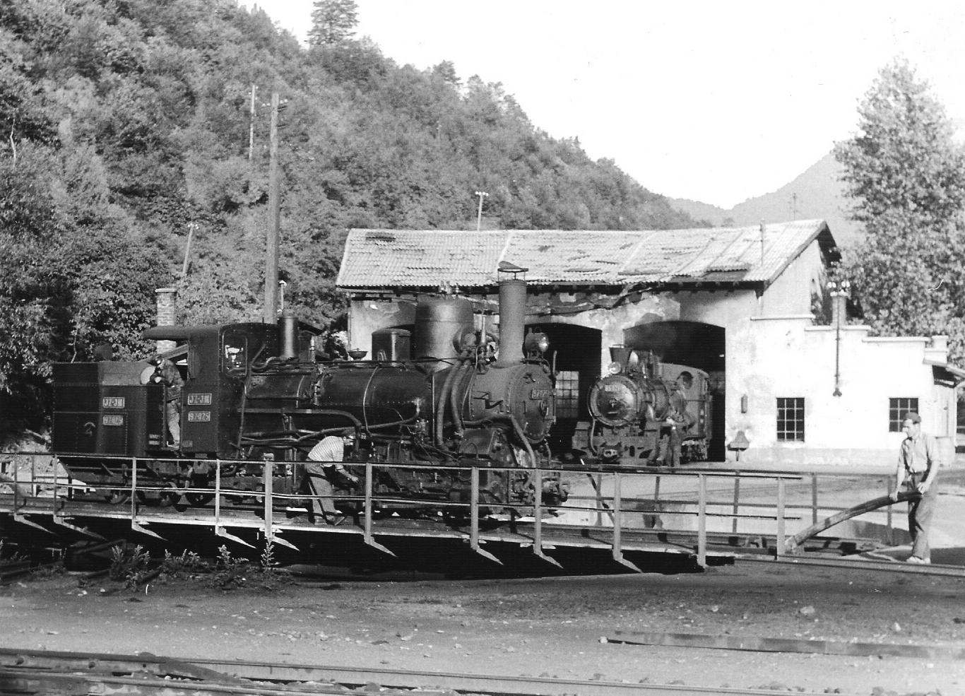 en: System Abt Rack engine 97-025 is being turned on the turntable at Bradina shed while a Class 85 2-8-2 can be seen in the roundhouse. de: Schmalspur-Zahnradbahnlokomotive System Abt JZ 97-025 beim Wenden auf der Drehscheibe in Bradina. Im Rundschuppen ist eine Schnellzuglok JZ 85 zu erkennen.